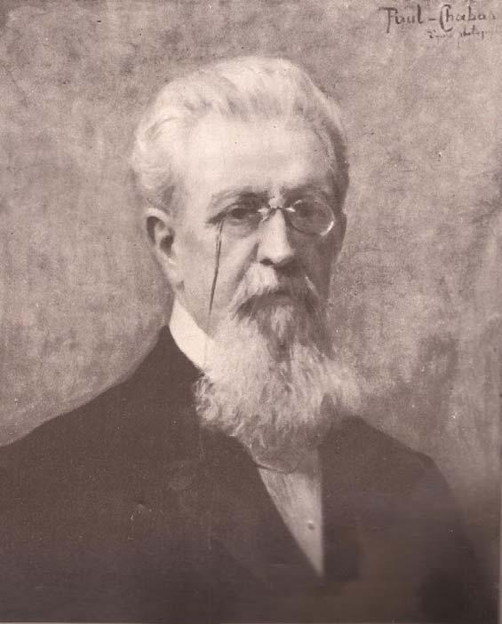 Retrato de Ángel de Estrada. Autor y fuente: Óleo de Paul Chabas (1869-1937). Imagen en dominio público, libre de derechos de autor.